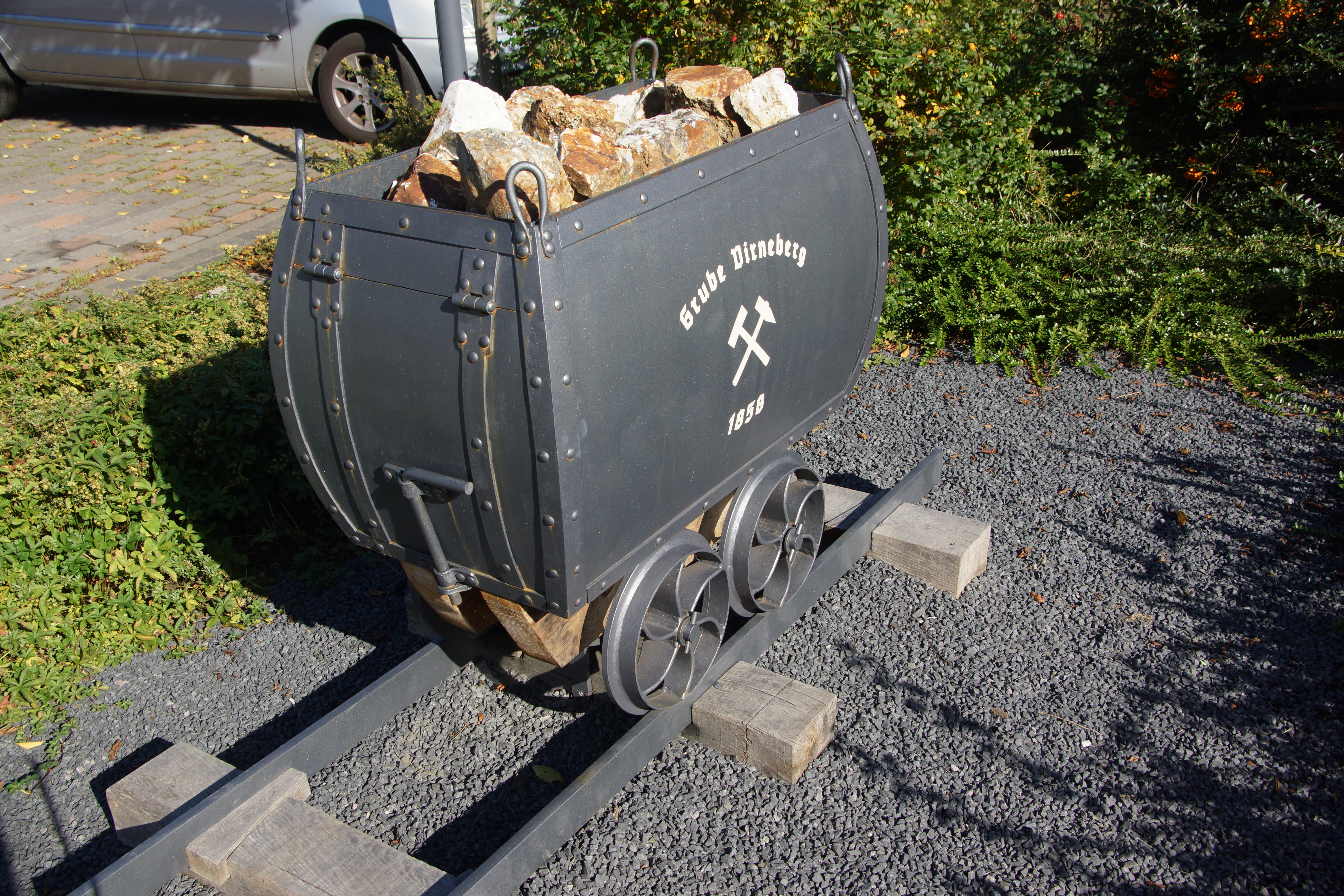 Nachbau eines historischen Grubenwagens des Bergwerks Virneberg (Rheinbreitbach, 1858)